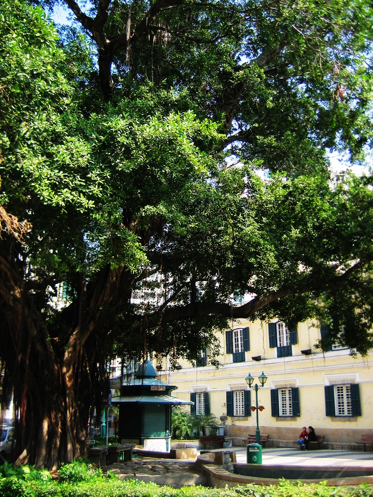 崗頂前地。